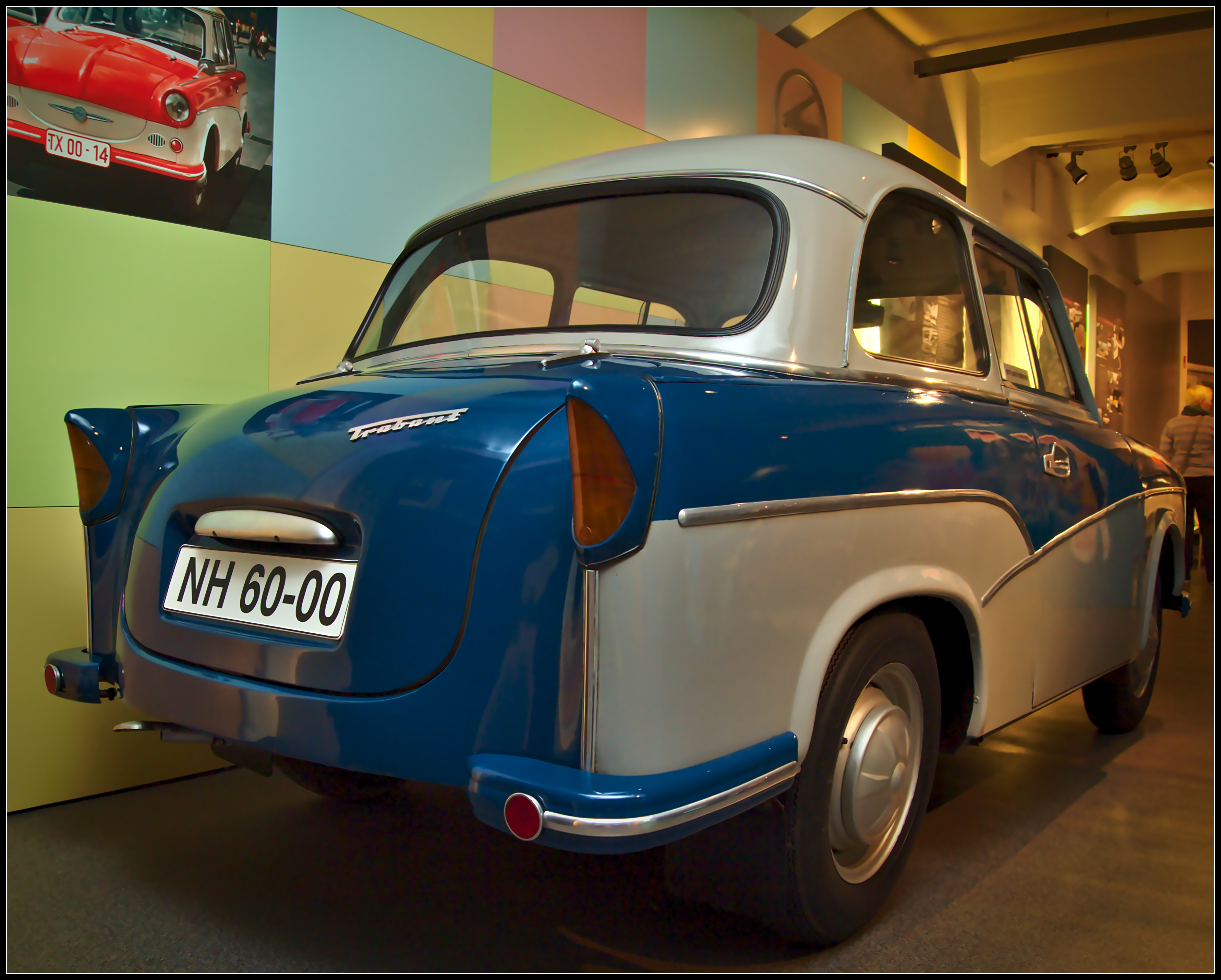 Trabant P50, Limousine, 1958 // Saloon, 1958 August Horch Museum Zwickau